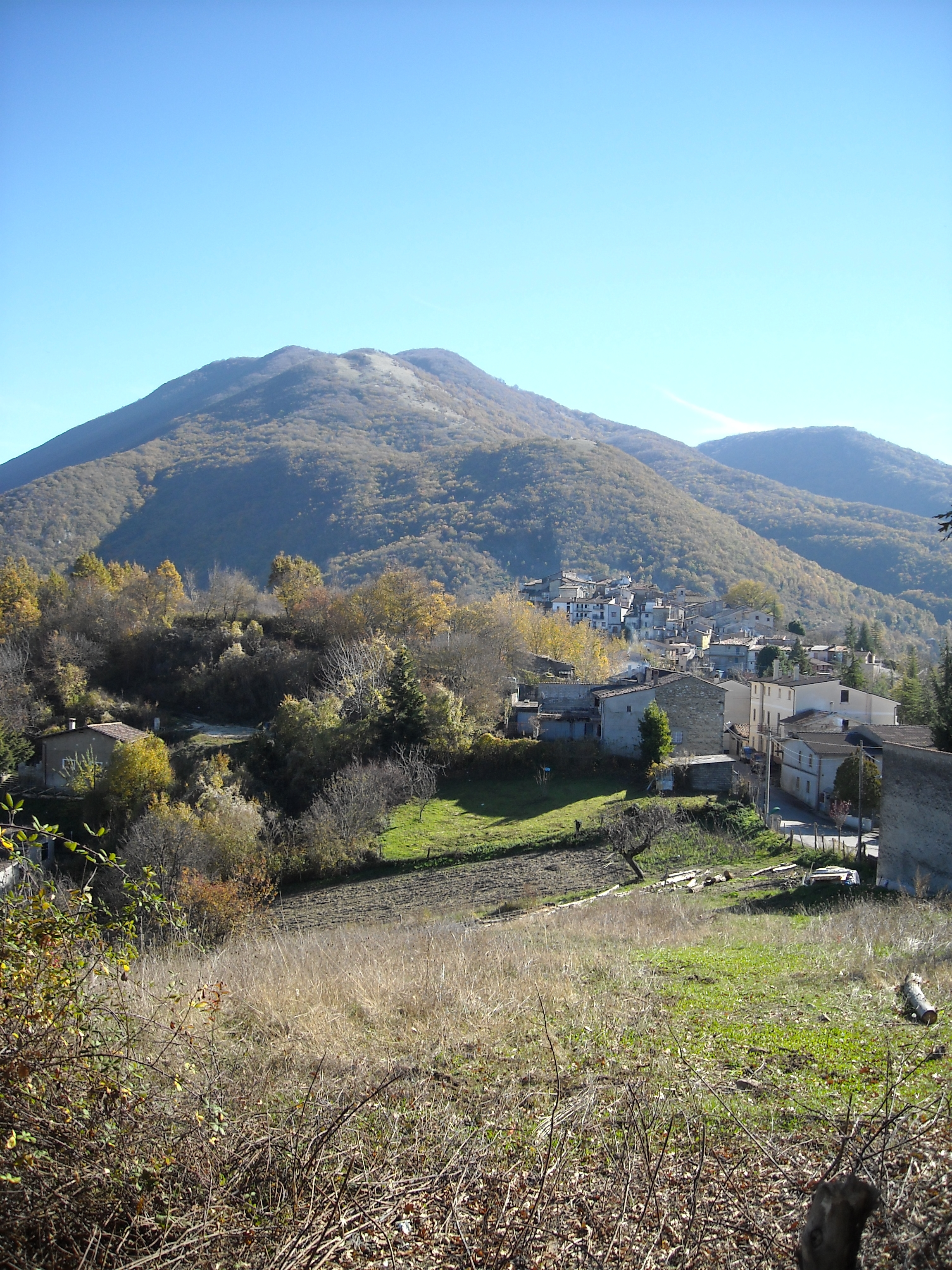 Panoramica del borgo di Villa Romana